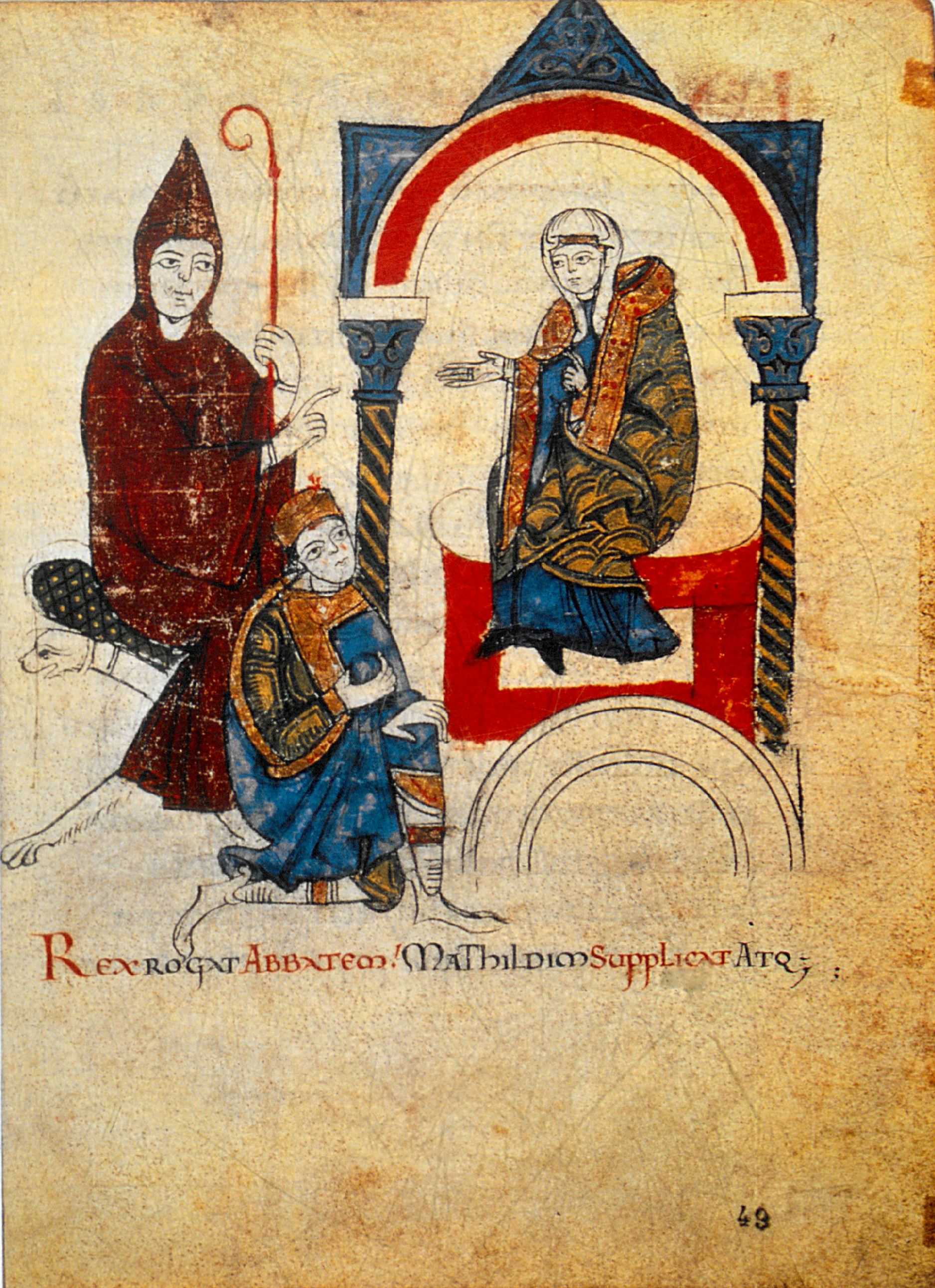 Mathilde von Tuszien und Hugo von Cluny als Fürsprecher Heinrichs IV. Die Bildunterschrift lautet: „Der König trägt dem Abt eine Bitte vor und geht vor Mathilde demütig in die Knie.“ (Rex Rogat abbatem Mathildim supplicat atque.) (Vita Mathildis des Donizo, um 1115. Vatikanstadt, Bibliotheca Apostolica Vaticana, Ms. Vat. lat. 4922, fol. 49v)